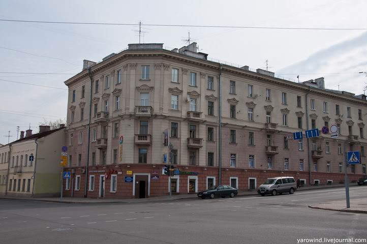 Интернациональная 2